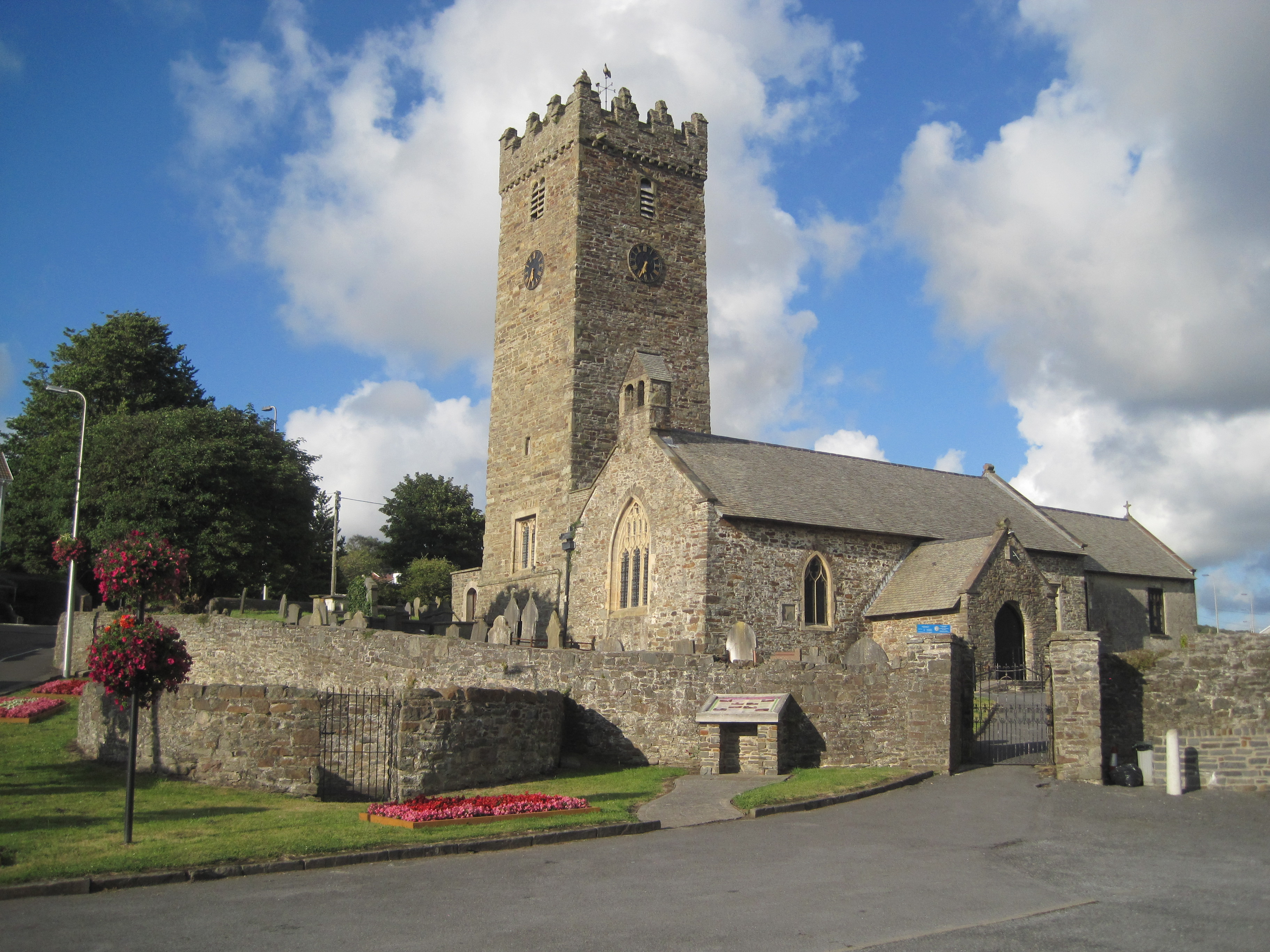 Eglwys Sant Illtyd, Pen-bre, Sir Gaerfyrddin. Corff a changell yr eglwys o'r 13eg ganrif.